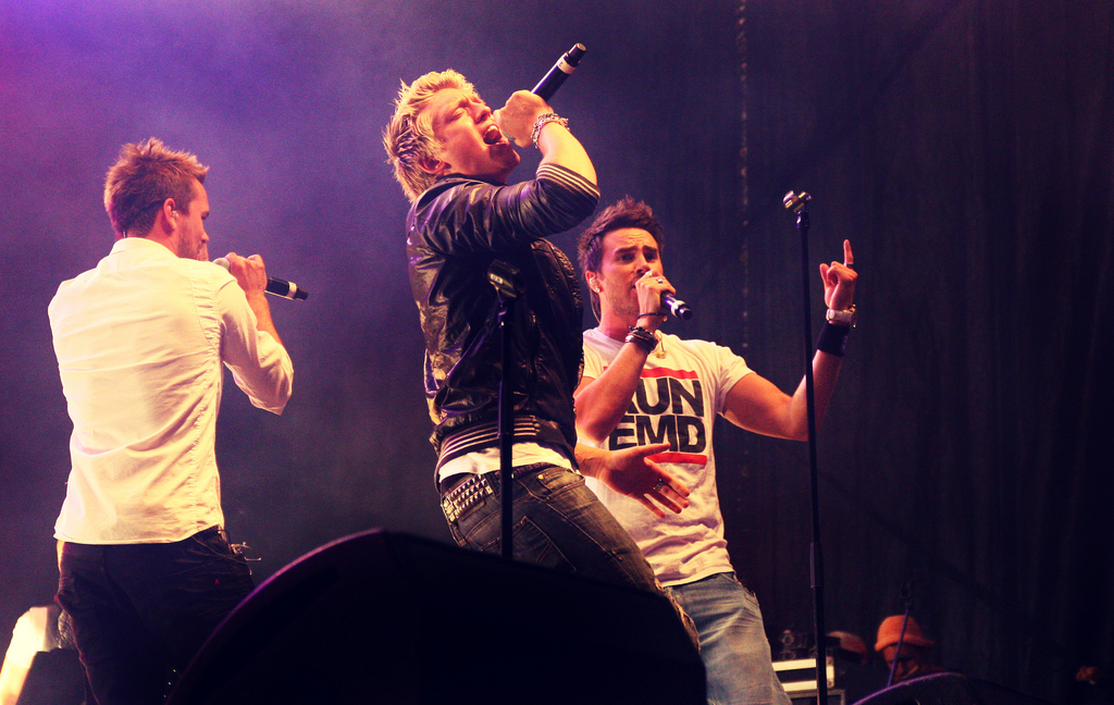 Rix FM Festival 2009, Kalmar, Sweden.